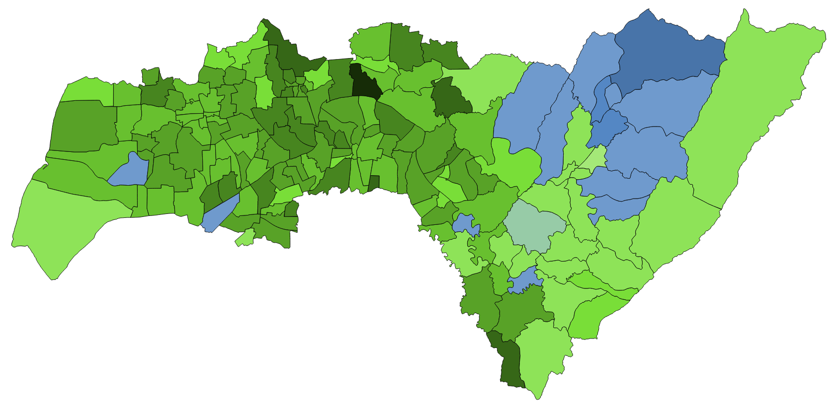 顏色對照表